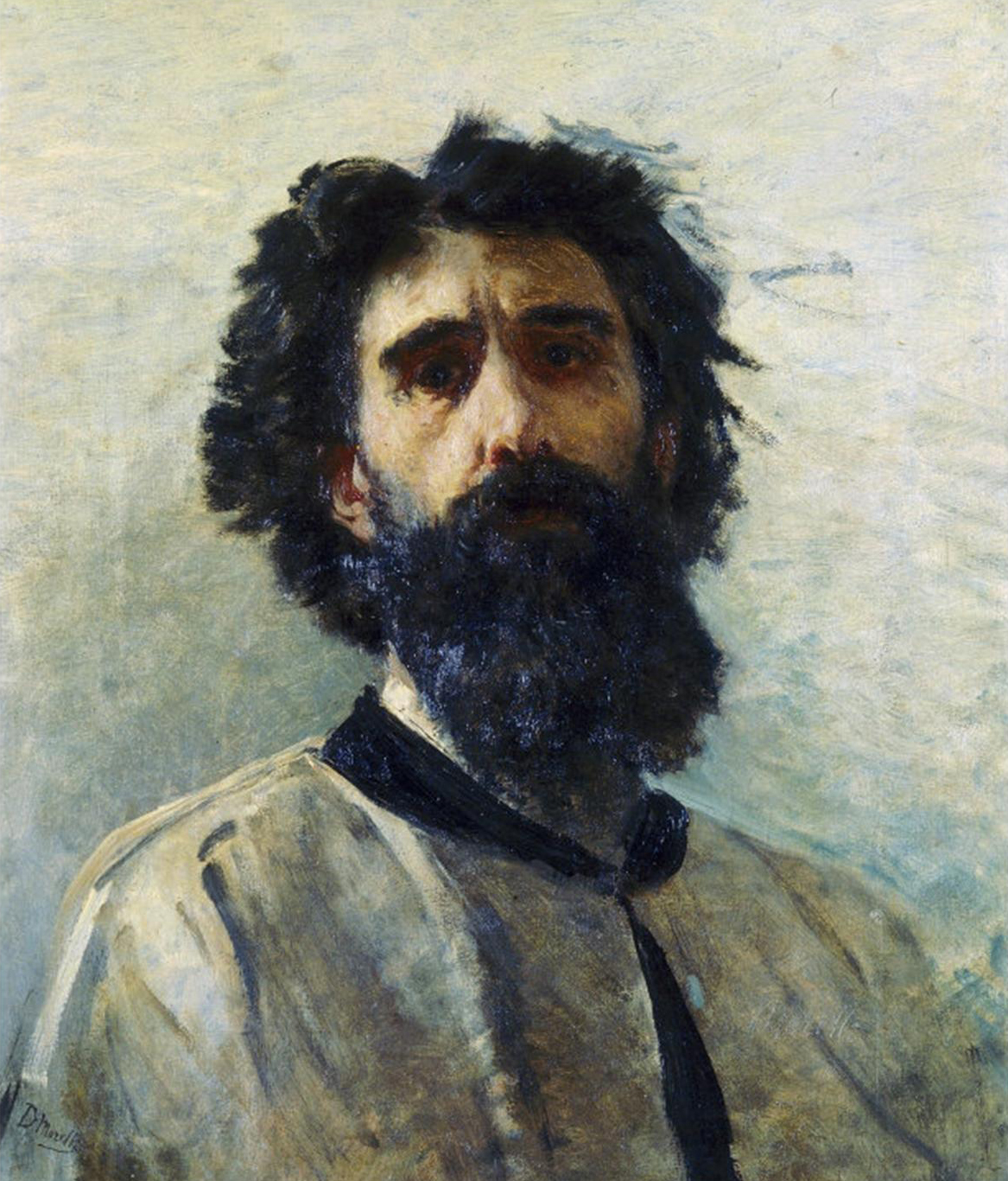 Self-portrait Domenico Morelli